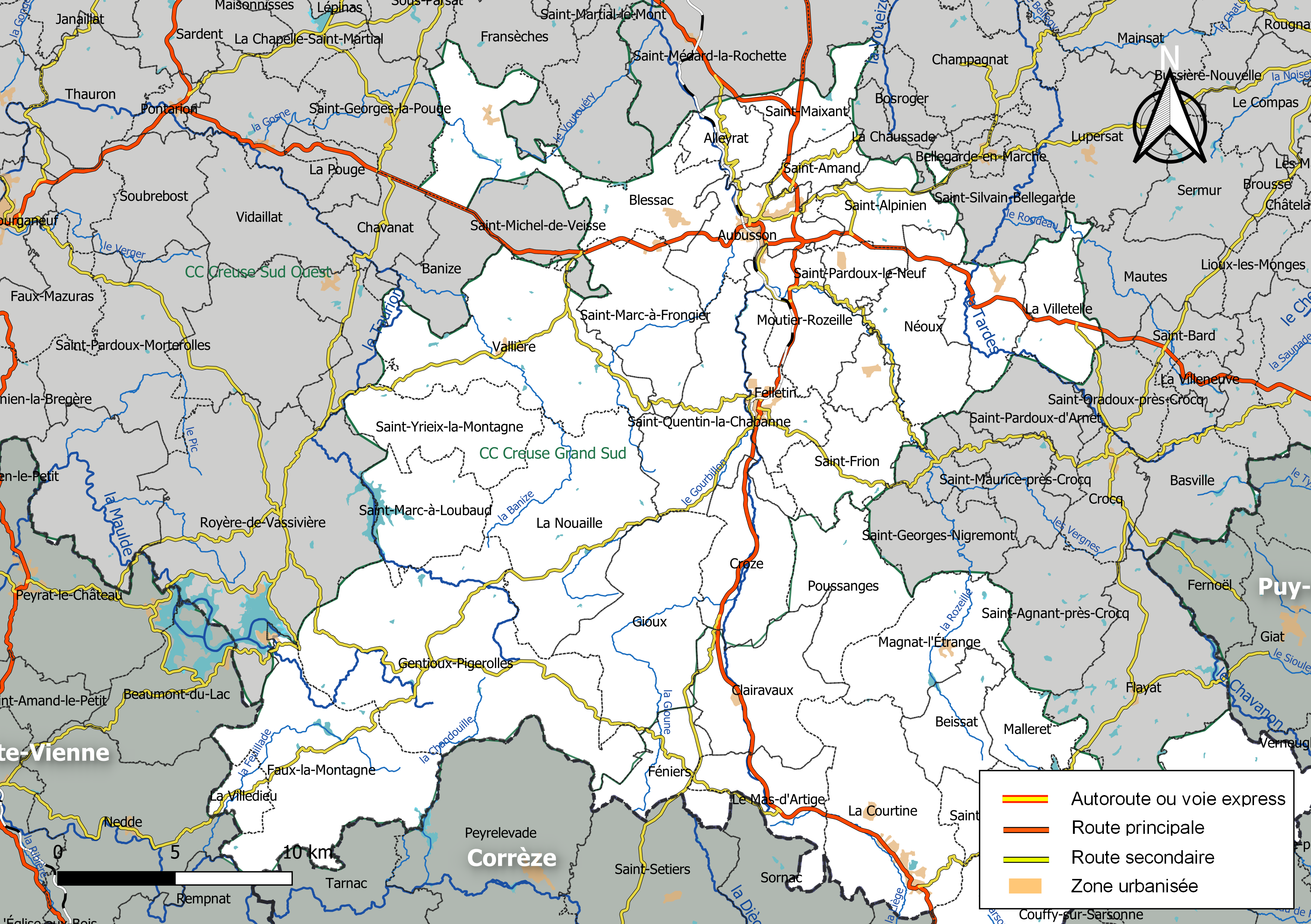 Carte géographique de la Communauté de communes Creuse Grand Sud, département de la Creuse, France. Composition au 1er janvier 2019.